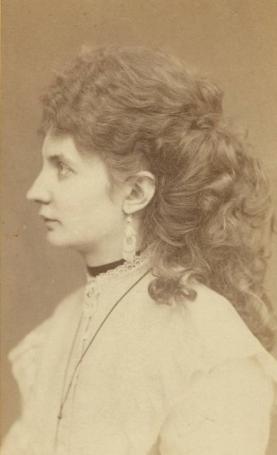 Bettina Smetanová (1840-1908), druhá manželka Bedřicha Smetany